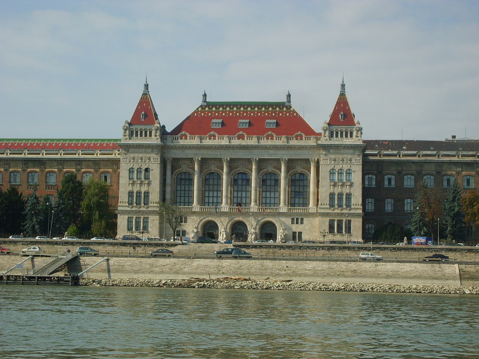 A BME K épülete (főépület)